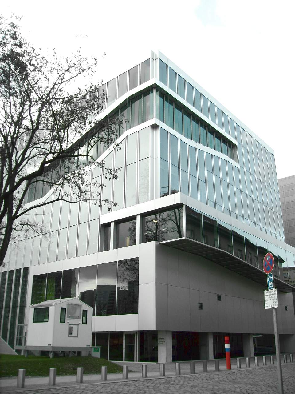 Dutch embassy in Berlin